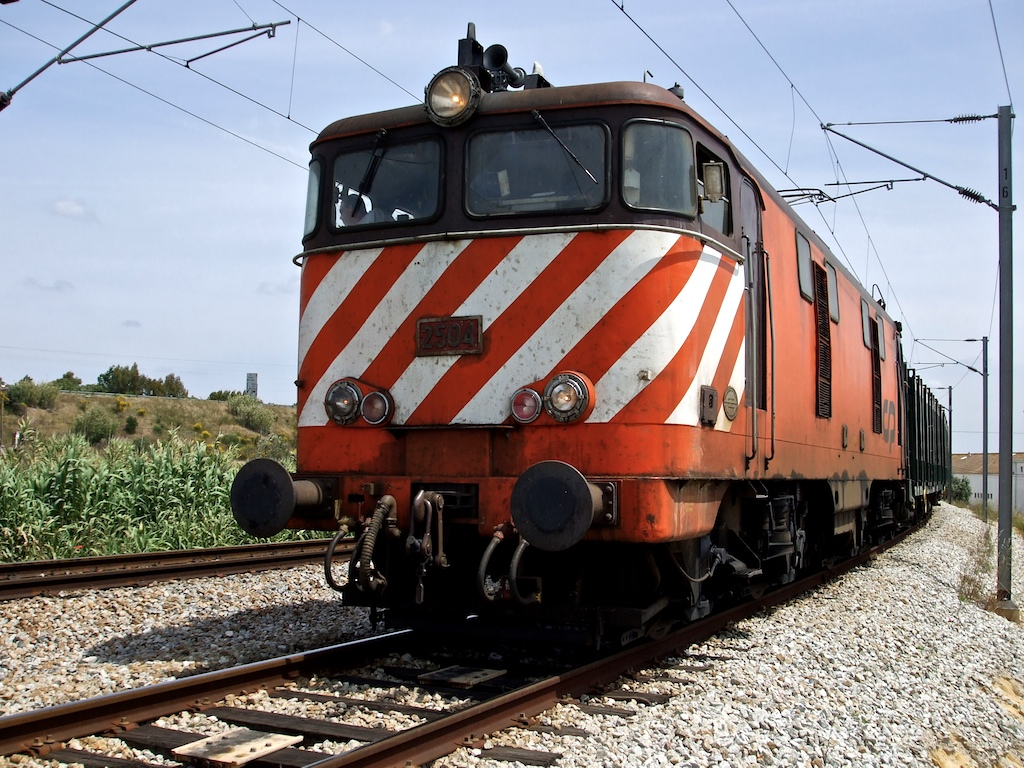 Tipo: Comboio de Transporte de Madeira 61080 [Sabóia - Praias do Sado] Local: Alcácer do Sal [Linha do Sul, PK 77] Data e hora: 3 de Junho de 2008 [14h58] Material: Locomotiva 2504 + 12 vagões CP Kbs